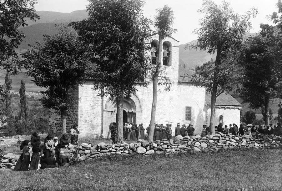 Imatge